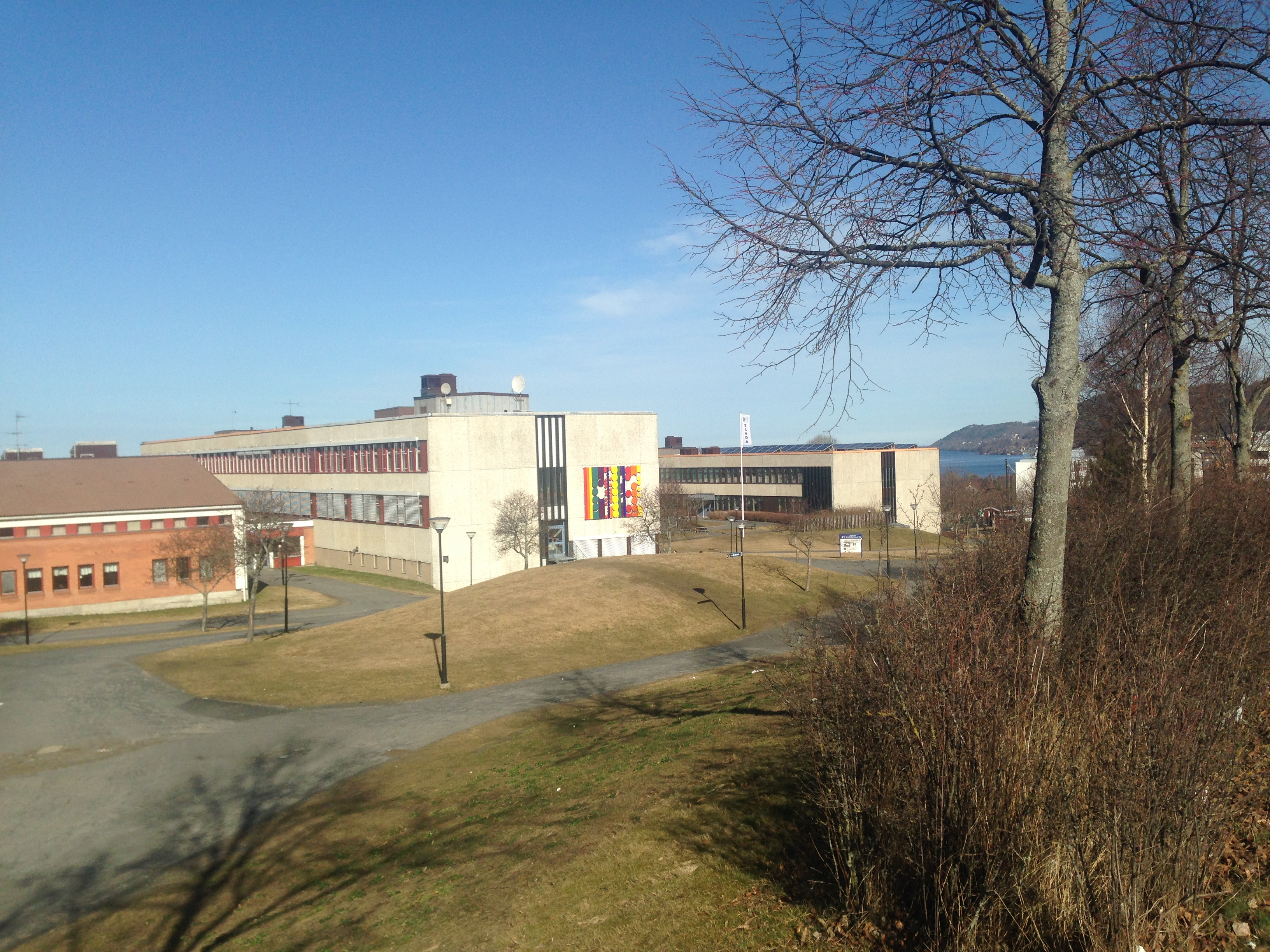 Sandagymnasiet i Huskvarna